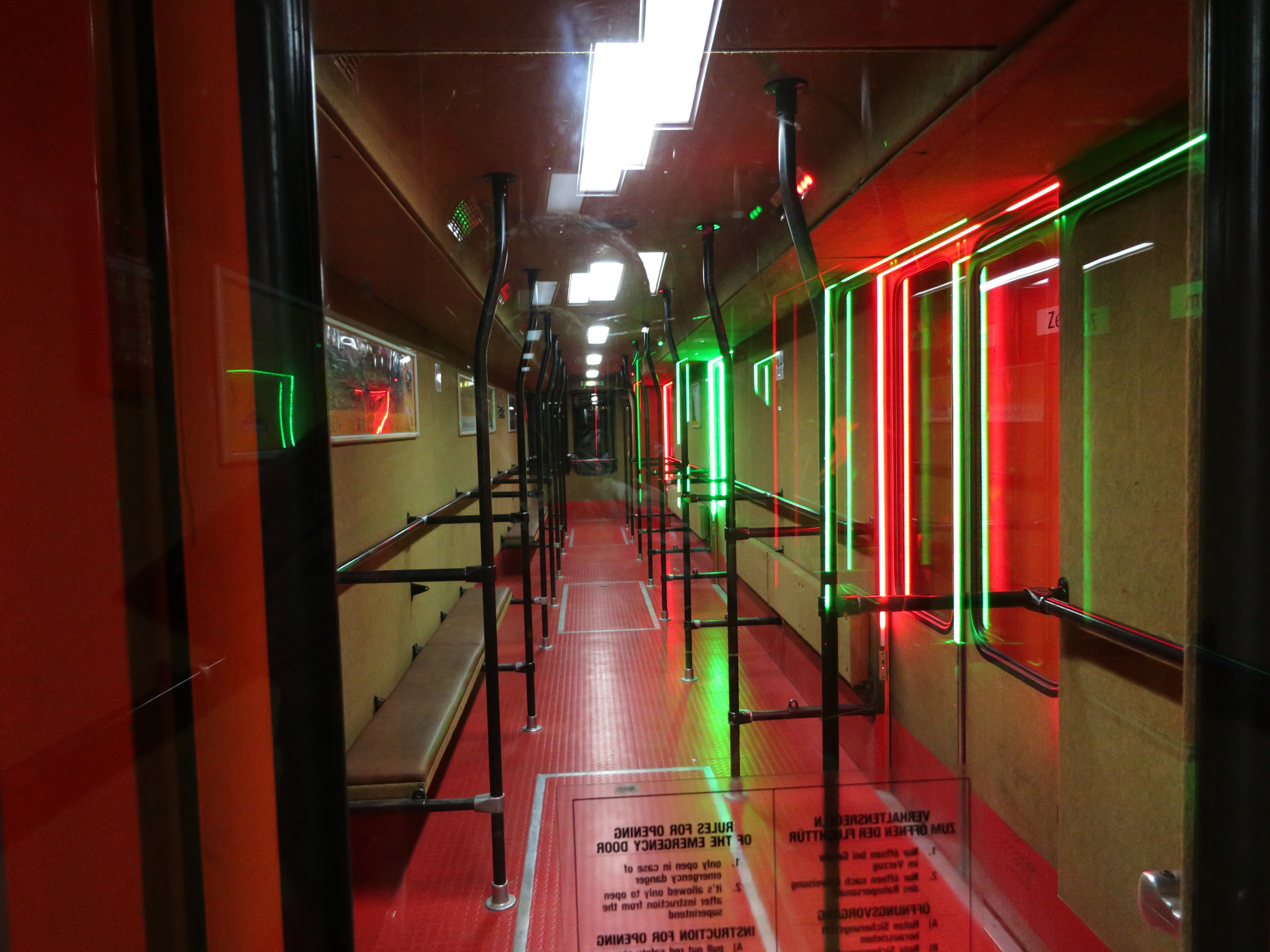 Serfaus Dorfbahn, Innenansicht